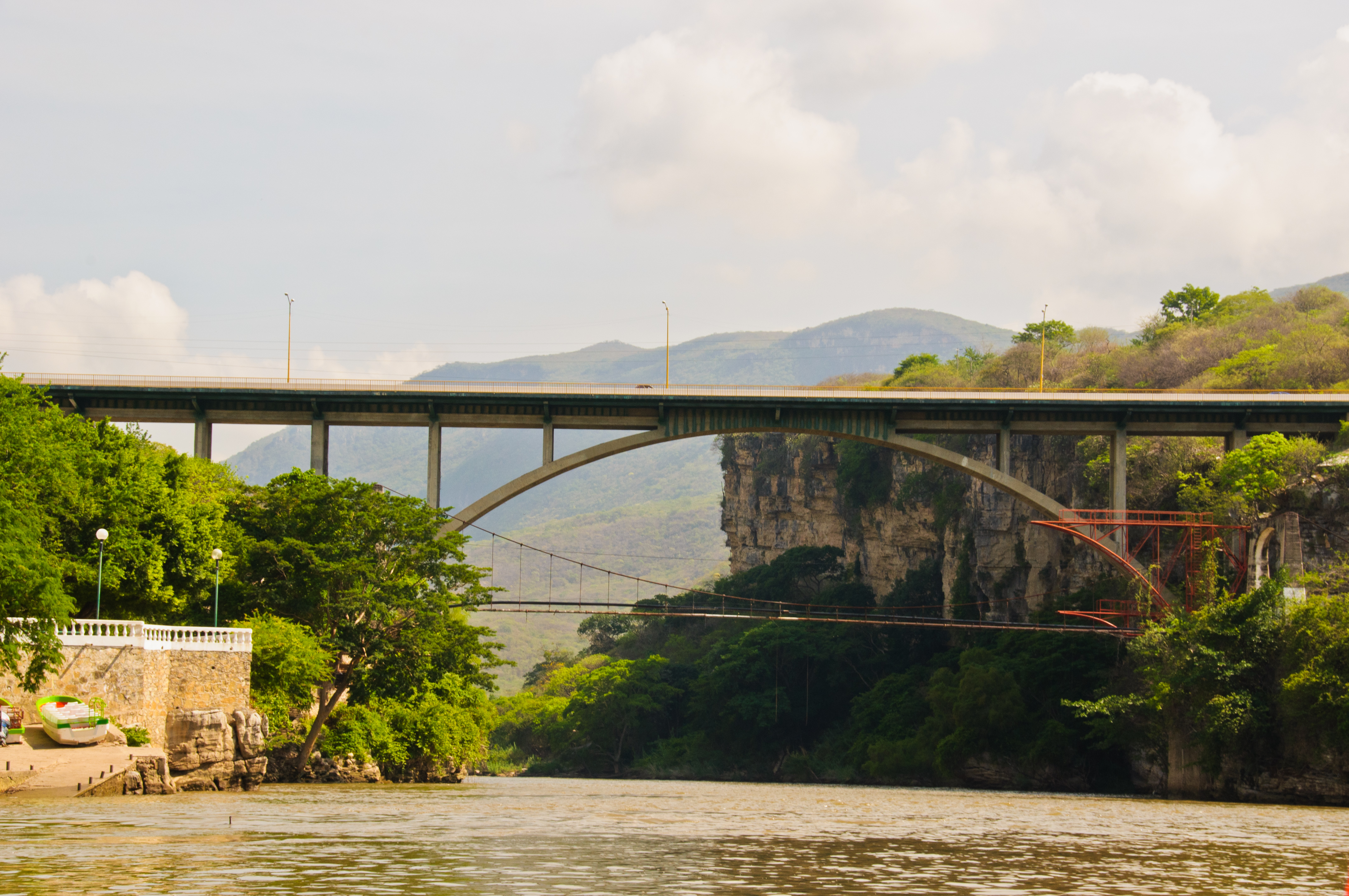 Puente Belisario Domínguez. Chiapas, Grijalva River, Mexico